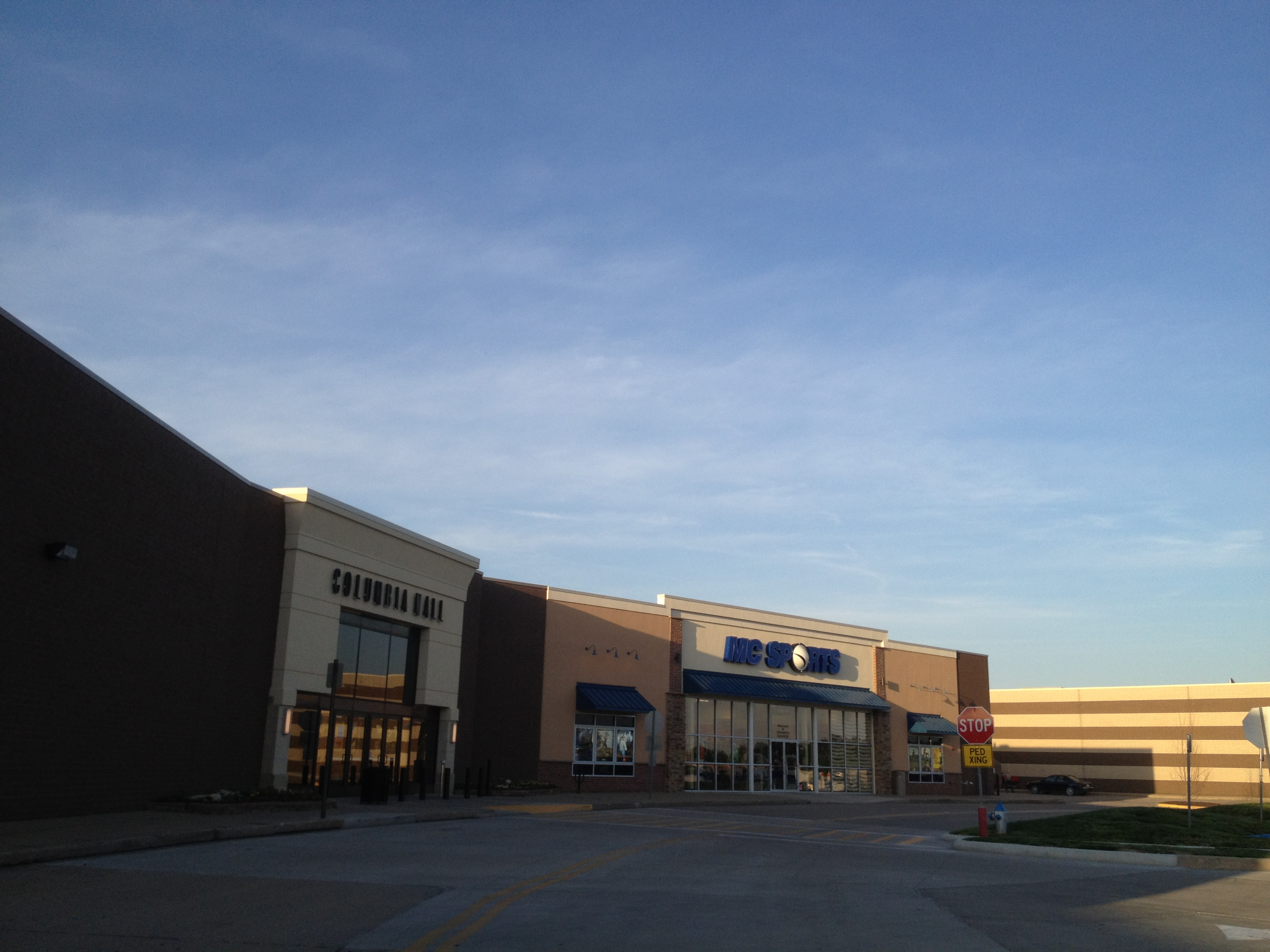 Columbia Mall